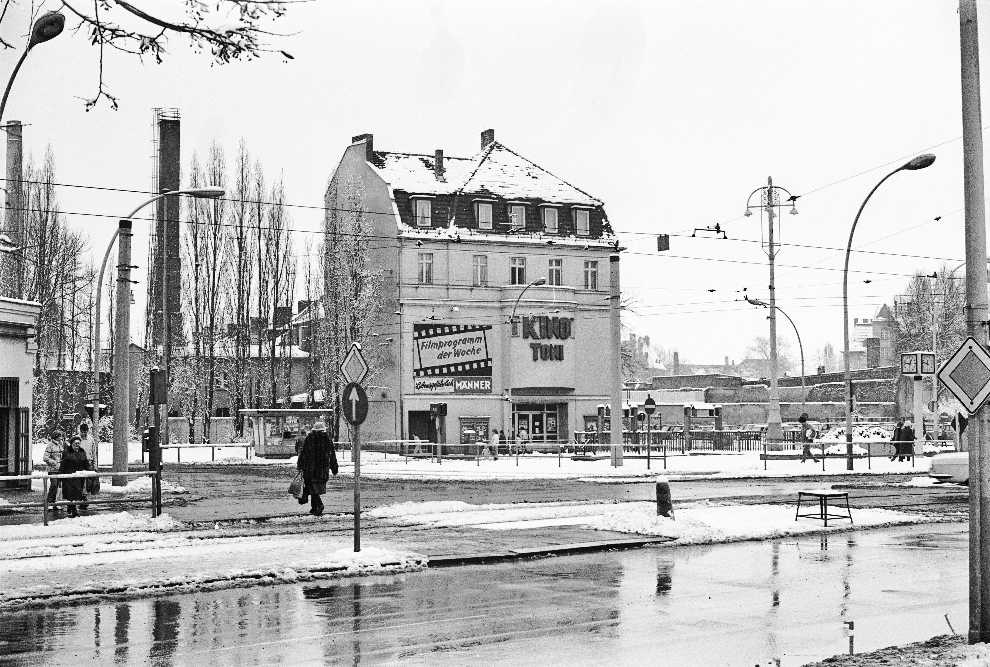 Lichtspieltheater, KINO TONI am Antonplatz, weitere Bilder auf : ddr-fotograf.de